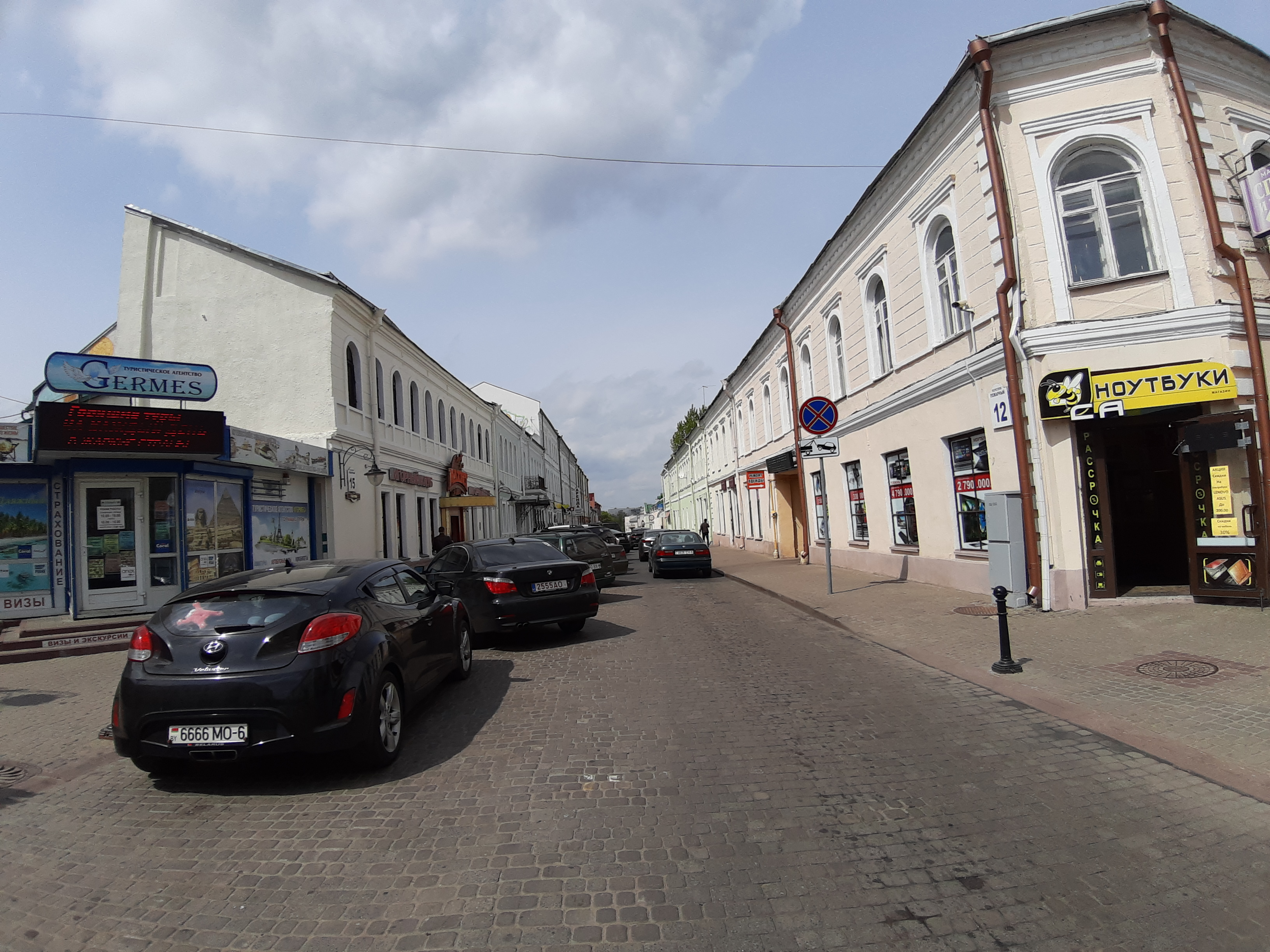 Магілёў. Па Ленінскай